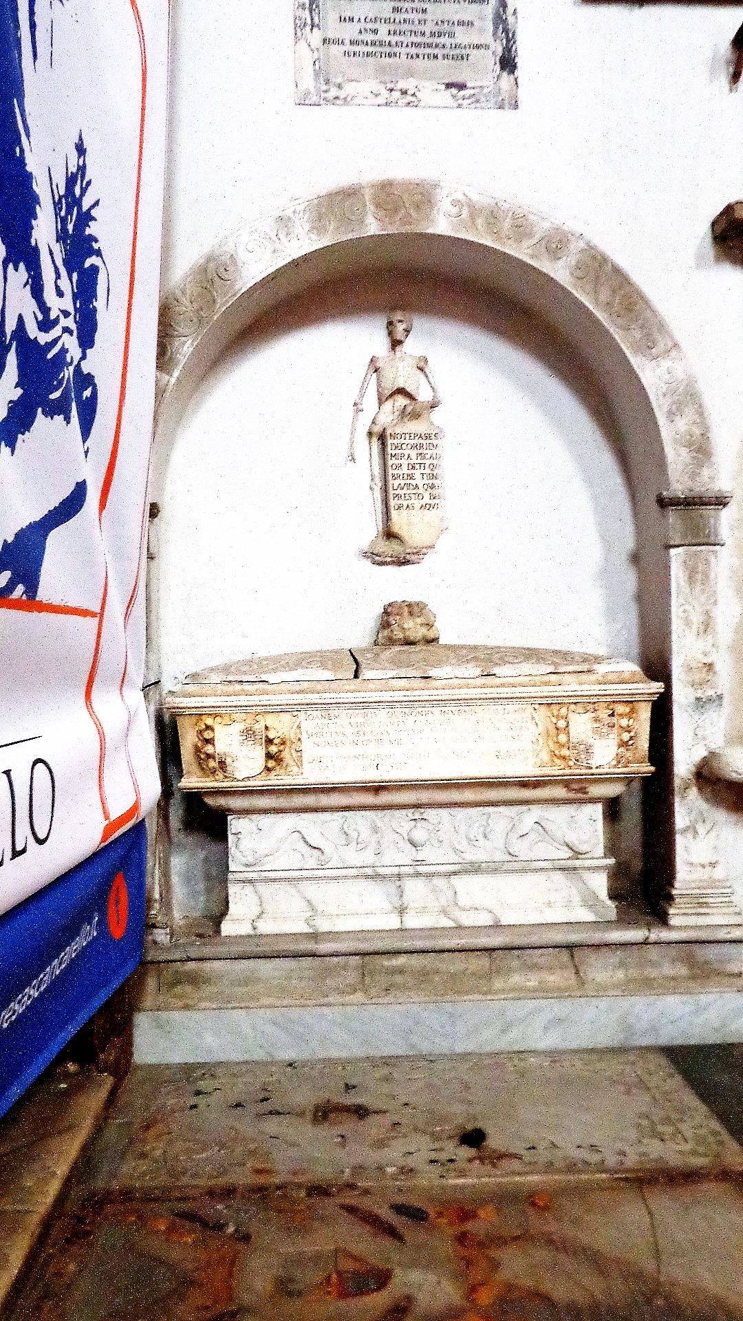 Sepolcro.